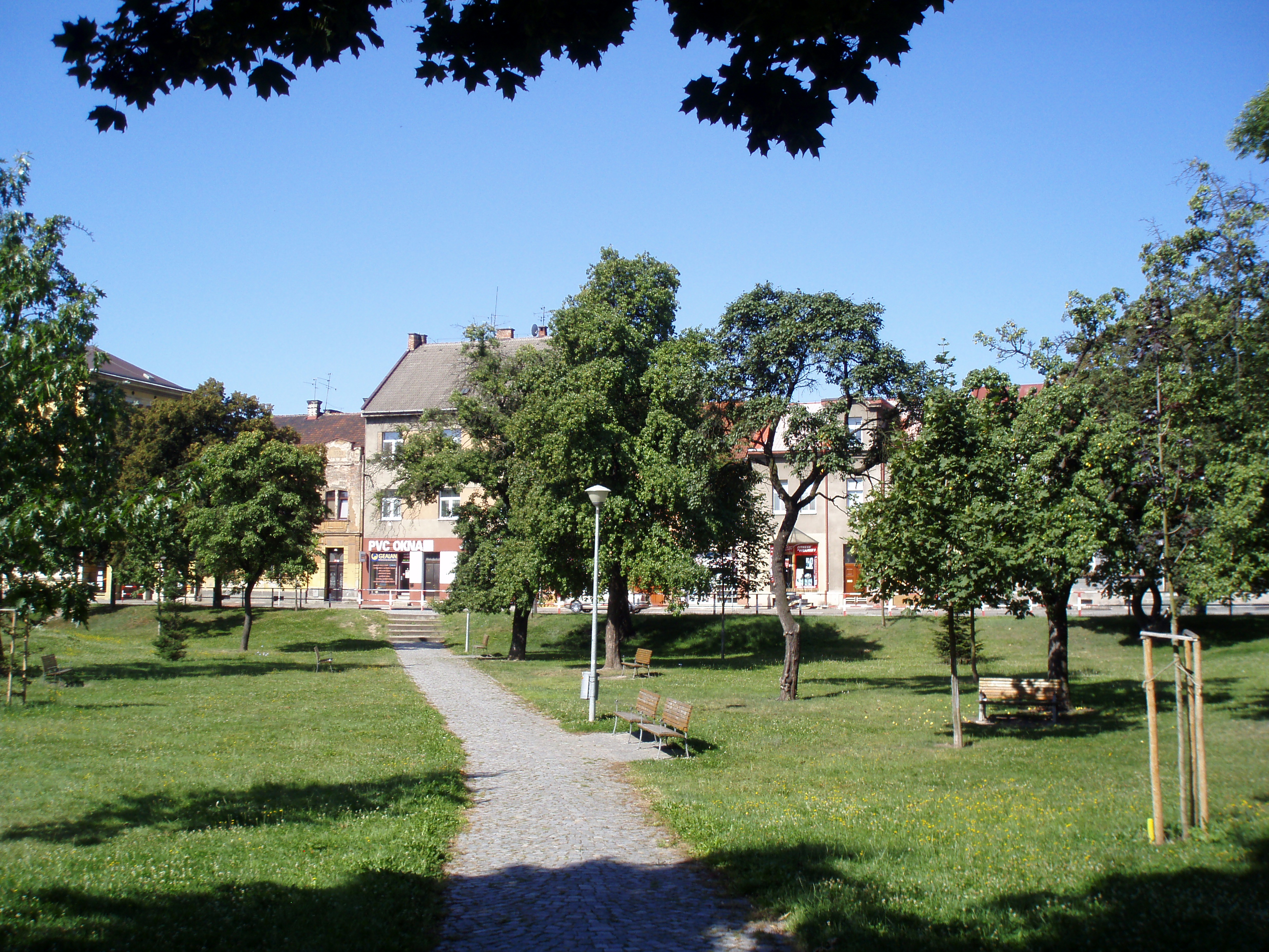 Sukovy sady, původně Fialovy sady (podle obecního starosty, zakladatele okrašlovacího spolku a iniciátora vzniku parku)